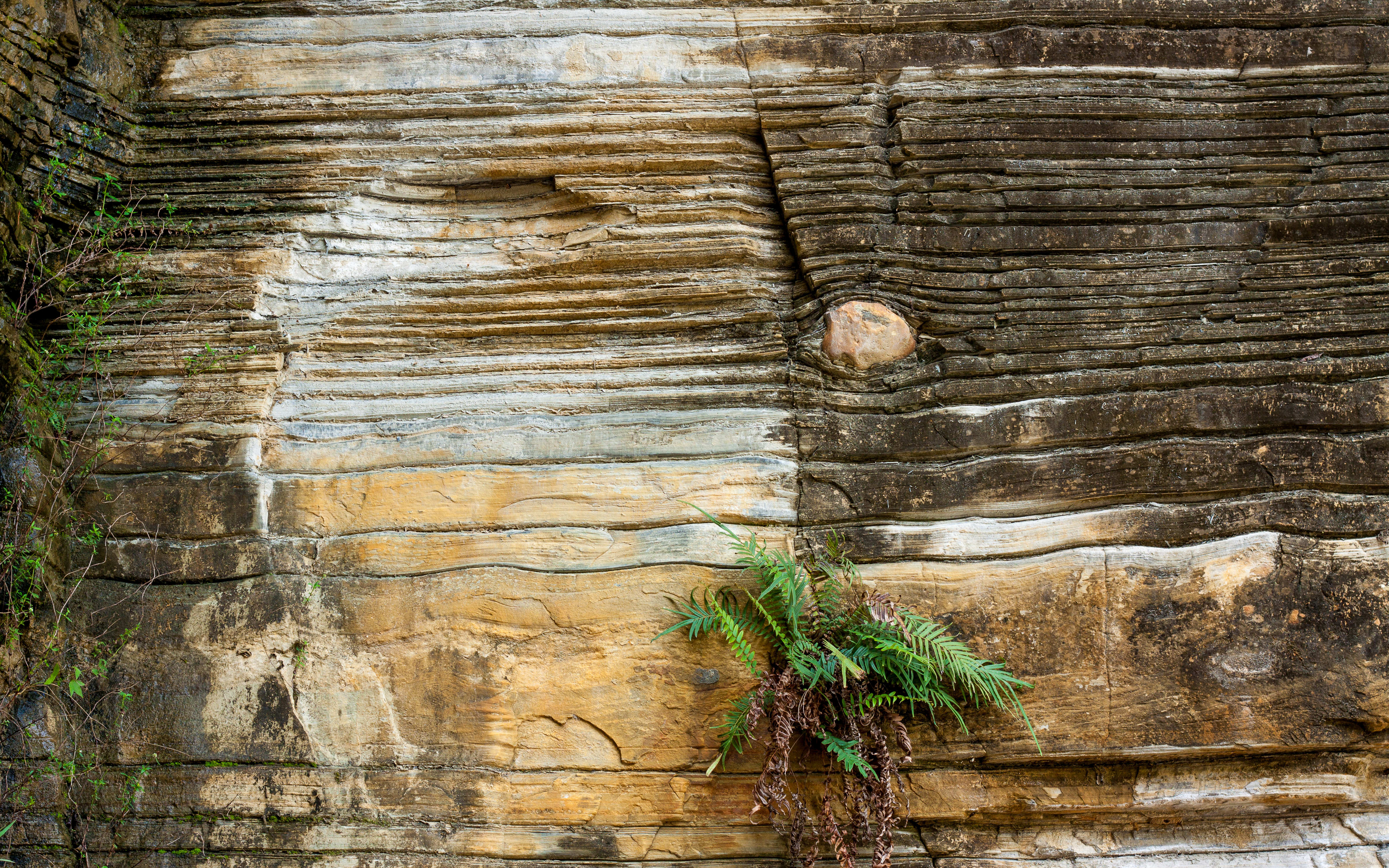 Parque Geológico do Varvito